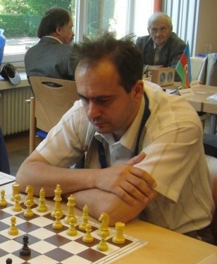 Александър Добрев, български шахматист на Международния комитет за тих шах